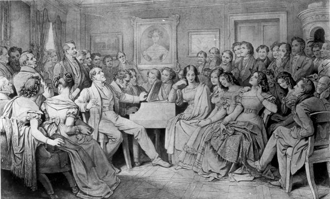 aus der Erinnerung gezeichnet Das Bild zeigt Franz Schubert am Klavier sowie Josef von Spaun, Johann Michael Vogl, Franz Lachner, Moritz von Schwind, Wilhelm August Rieder, Leopold Kupelwieser, Eduard von Bauernfeld, Franz von Schober, Franz Grillparzer und auf dem Bild an der Wand Komtess Karoline Esterházy.